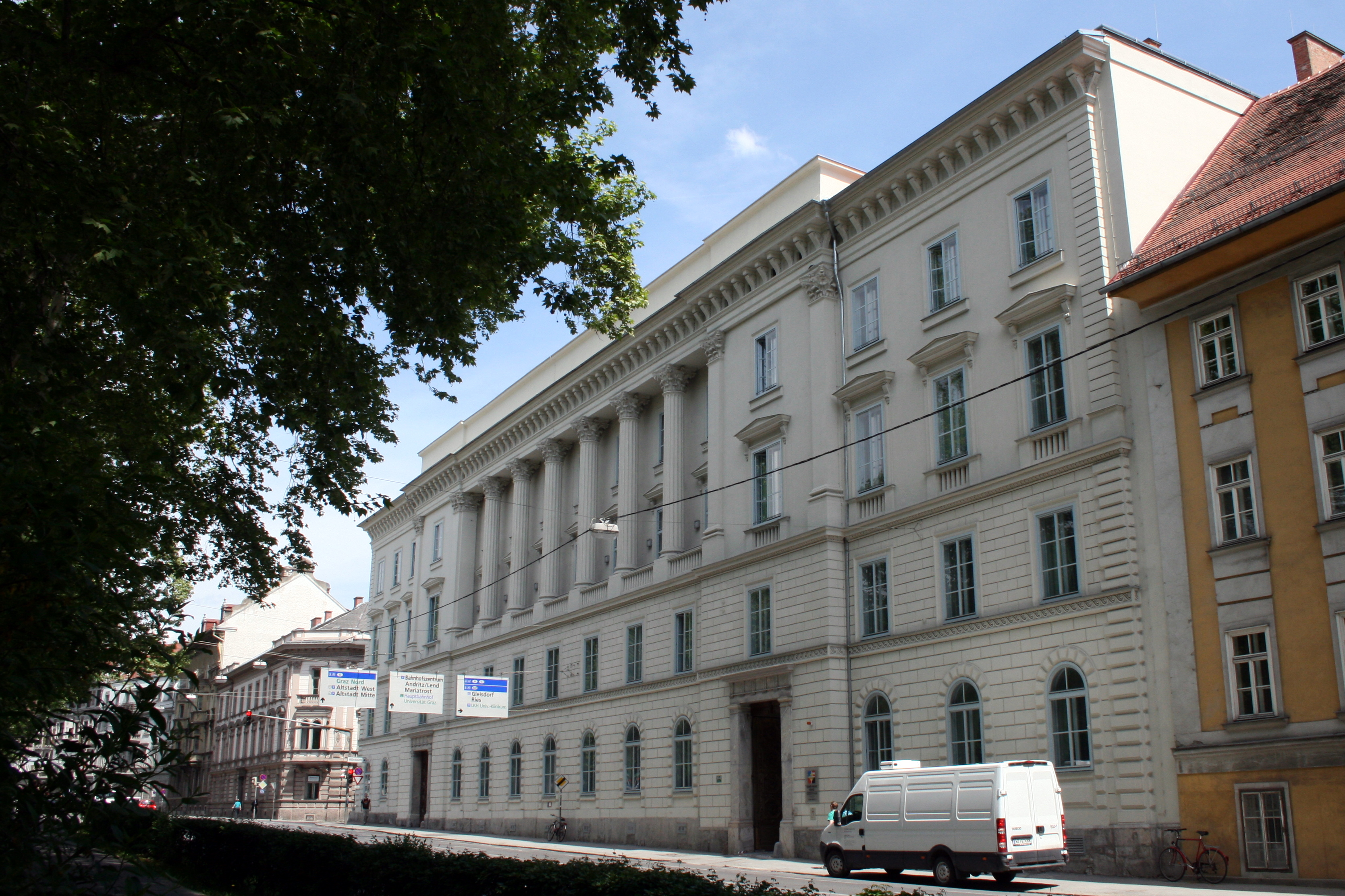 Ehem. Stadtpalais Kees, Militärkommando Steiermark